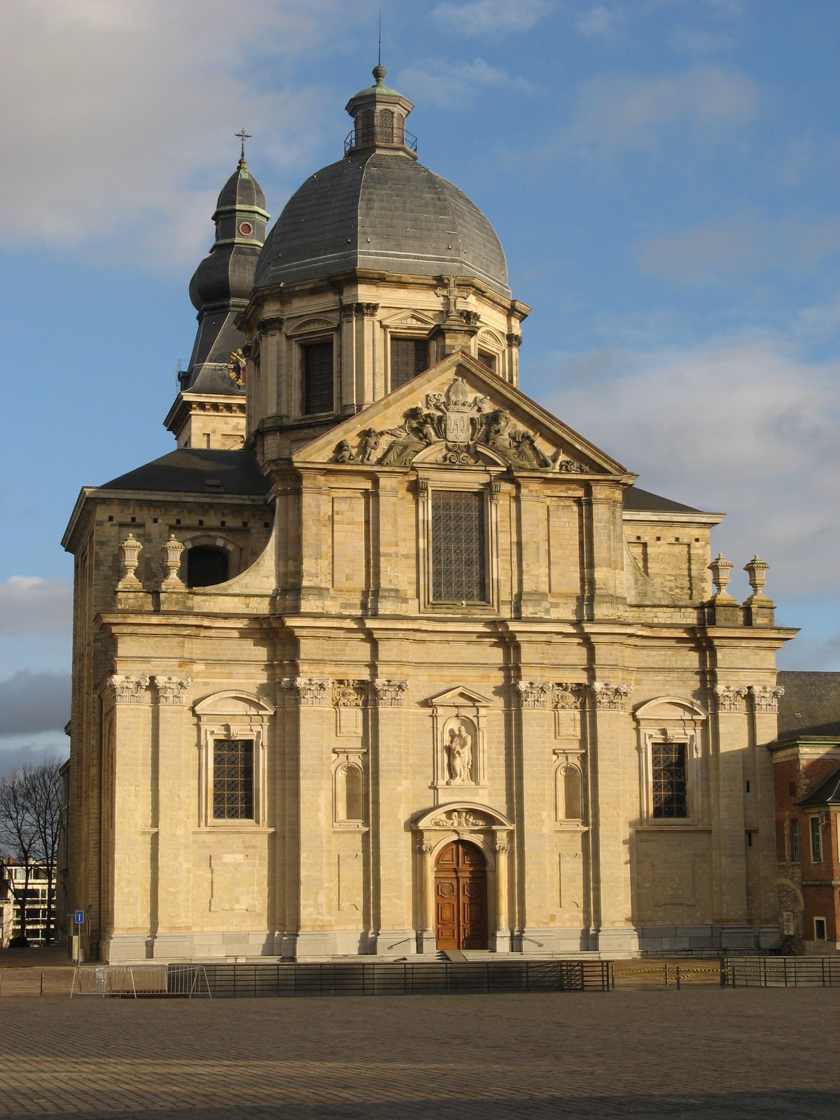 Ghent